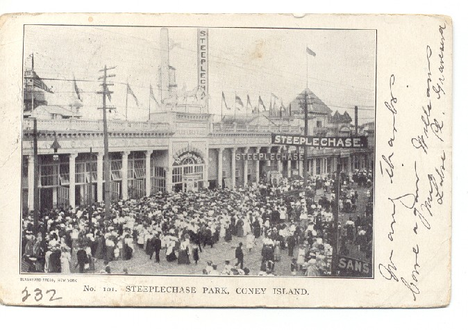 Der Steeplechase Park auf Coney Island, New York vor dem Brand im Jahre 1907. Postkarte von 1905.